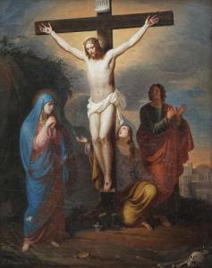 Gennaro Maldarelli, Crucifixion (1843), collection particulière.